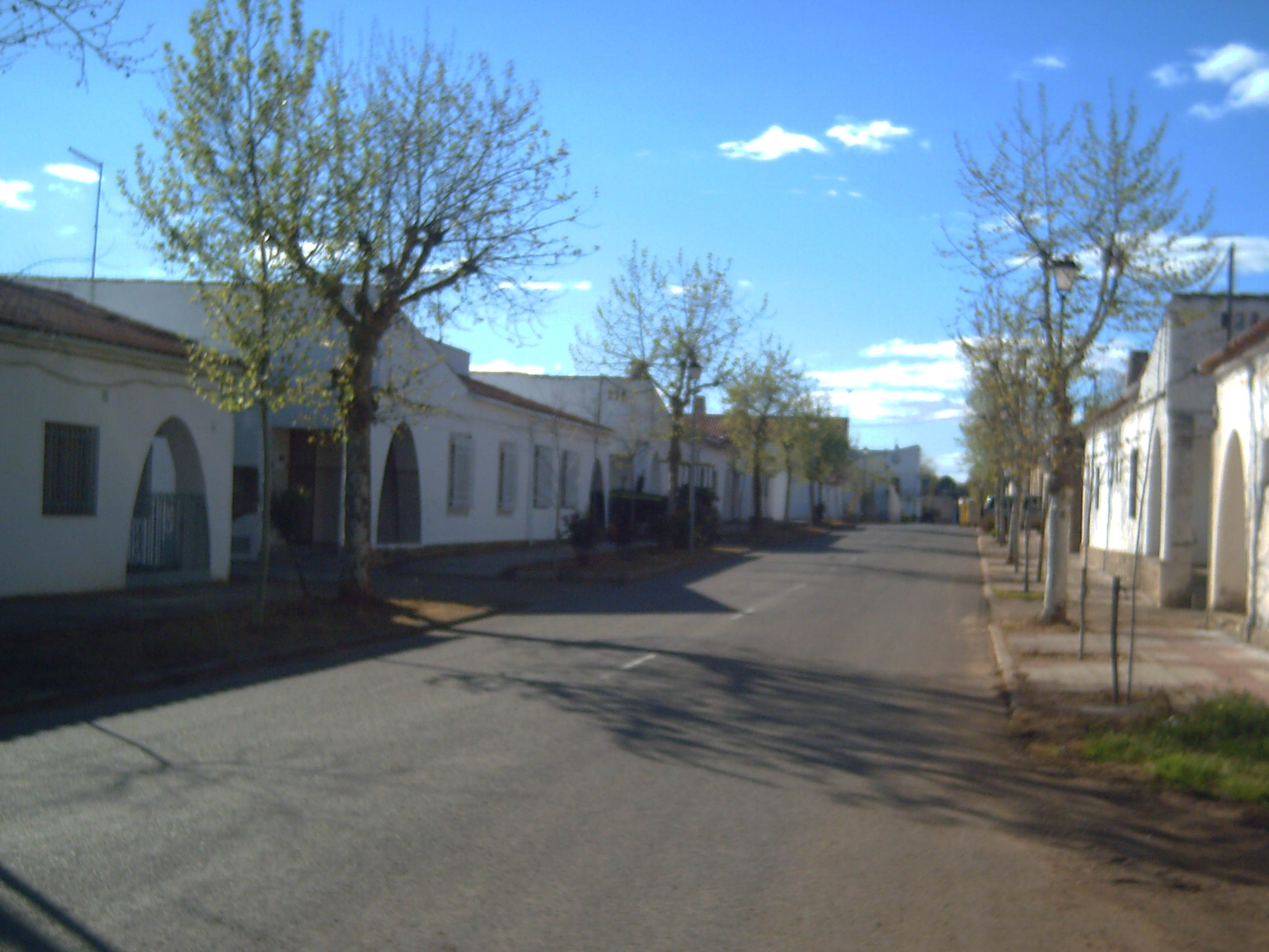 Calli en Rincón de Ballesterus (Caçris)